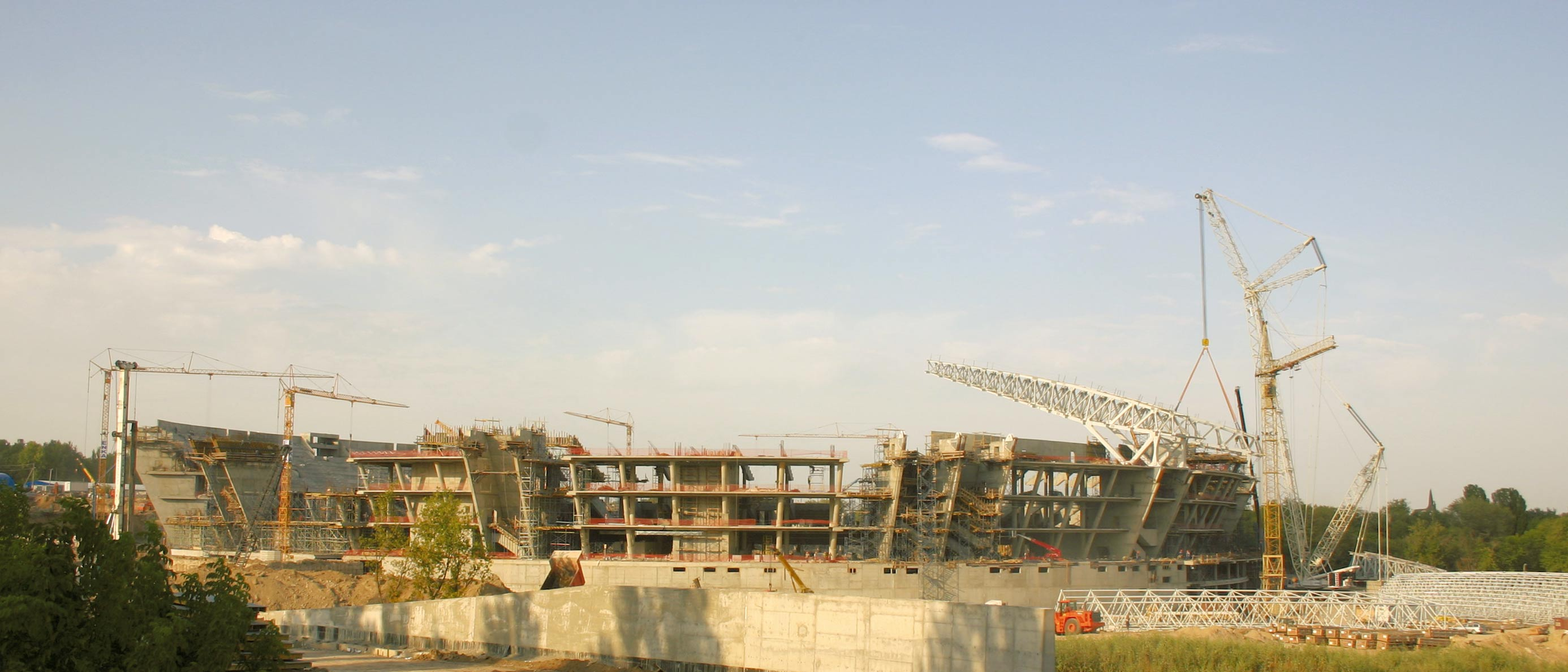 Neubau des Zentralstadions Schachtar in Donezk.